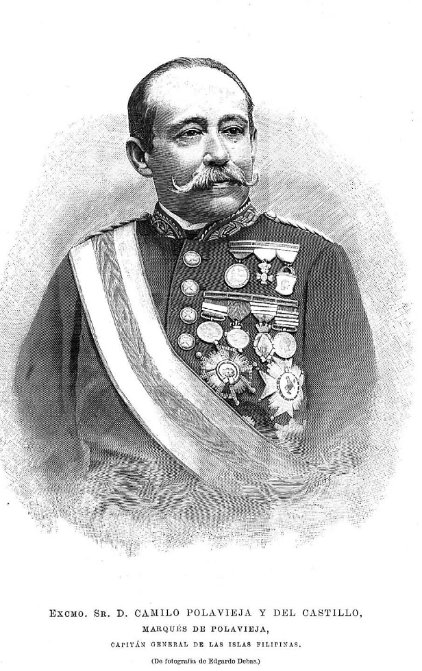 Grabado que retrata a Camilo García de Polavieja, a partir de una fotografía de Edgardo Debás, recogido en la revista española La Ilustración Española y Americana.